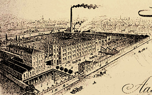 Schaubild der Tuchfabrik Aachen AG um 1925